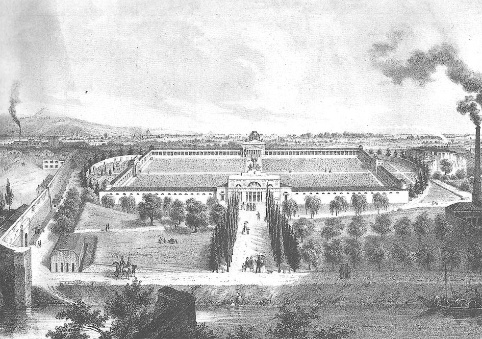 Il Cimitero Monumentale di Verona in una incisione ottocentesca